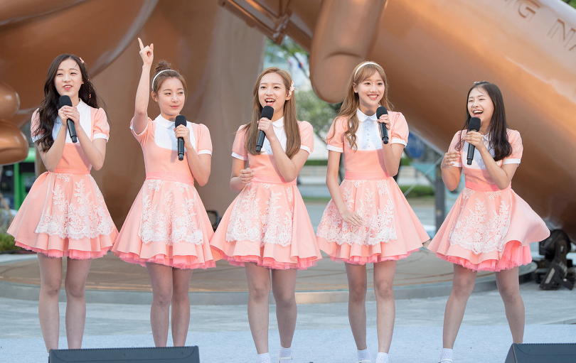 [16.04.15] 강남스타일 조형물 제막식 (에이프릴)